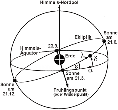 Beschreibung: Die Ekliptik (ekliptikale Länge λ, Ekliptikschiefe ε) im geozentrischen äquatorialen Koordinatensystem (Rektaszension α, Deklination δ) + die vier Hauptstellungen der Sonne (Jahreszeiten: Tagundnachtgleichen, Sonnenwenden) Quelle: selbst gezeichnet Zeichner: Geof 30. Jul 2004 Andere Versionen: größer Ekliptik "horizontal" Lizenzstatus: GNU FDL